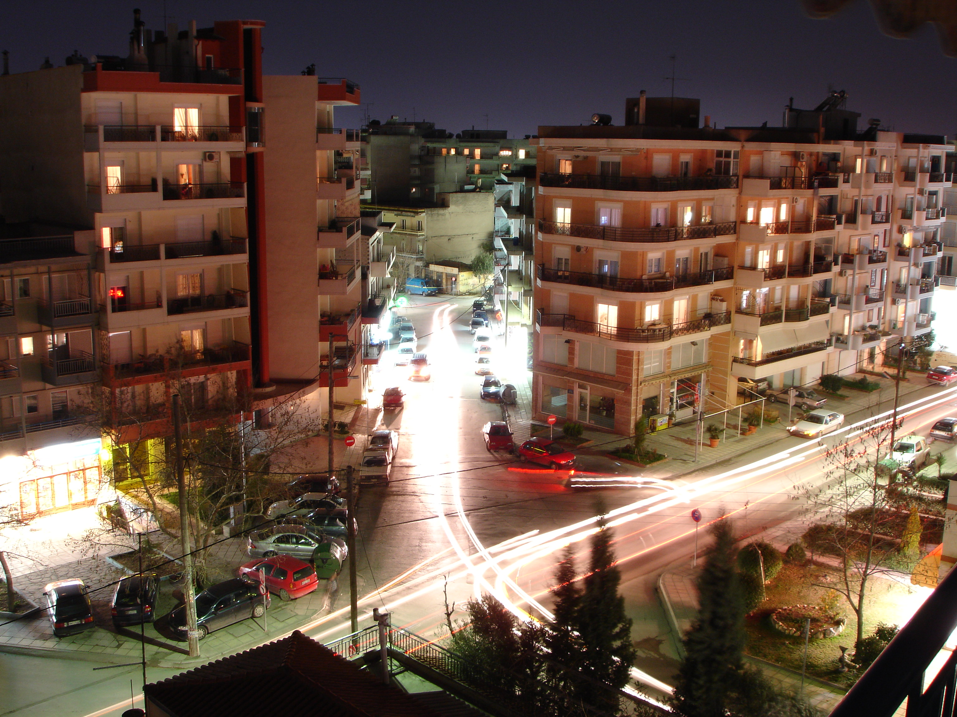 ΕΥΟΣΜΟΣ, 25ης Μαρτίου & Σμύρνης